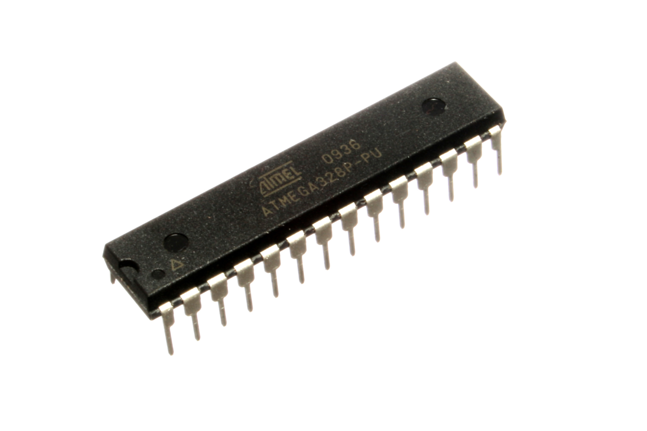 ATmega328P-PU.